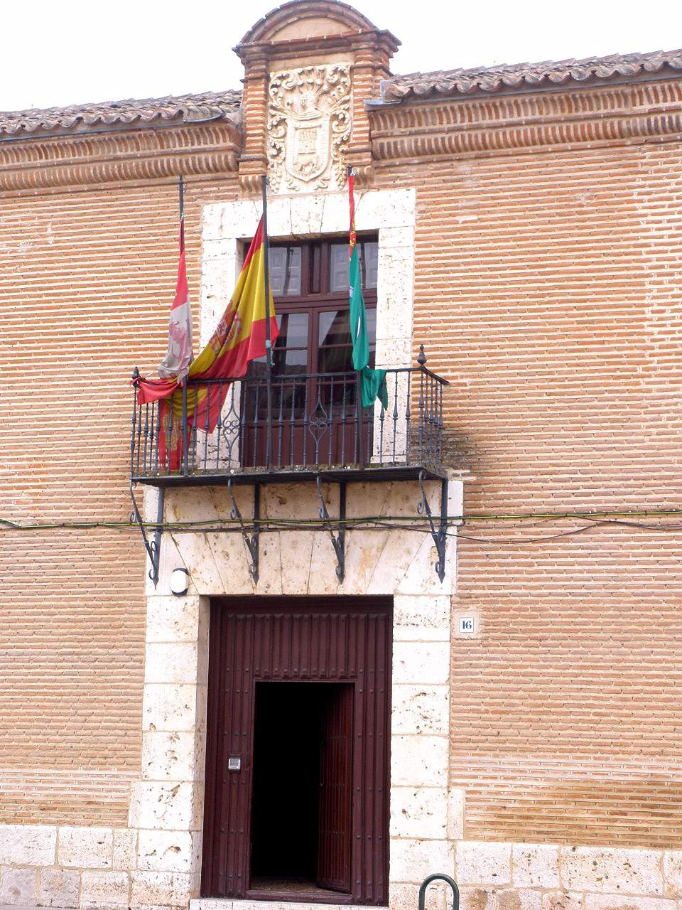 Estación Enológica de Castilla y León, en Rueda (Valladolid)